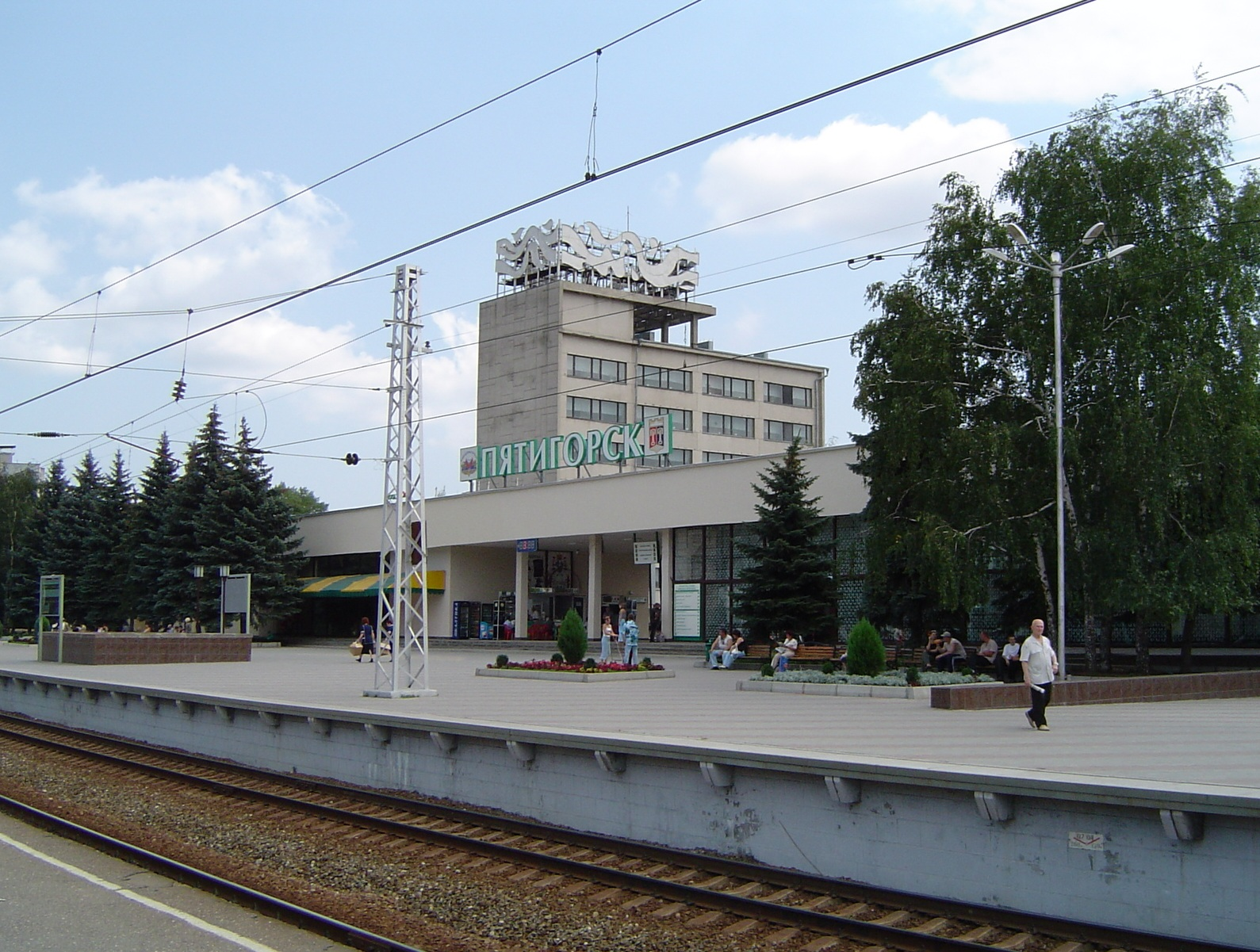 Вид со второй пассажирской платформы